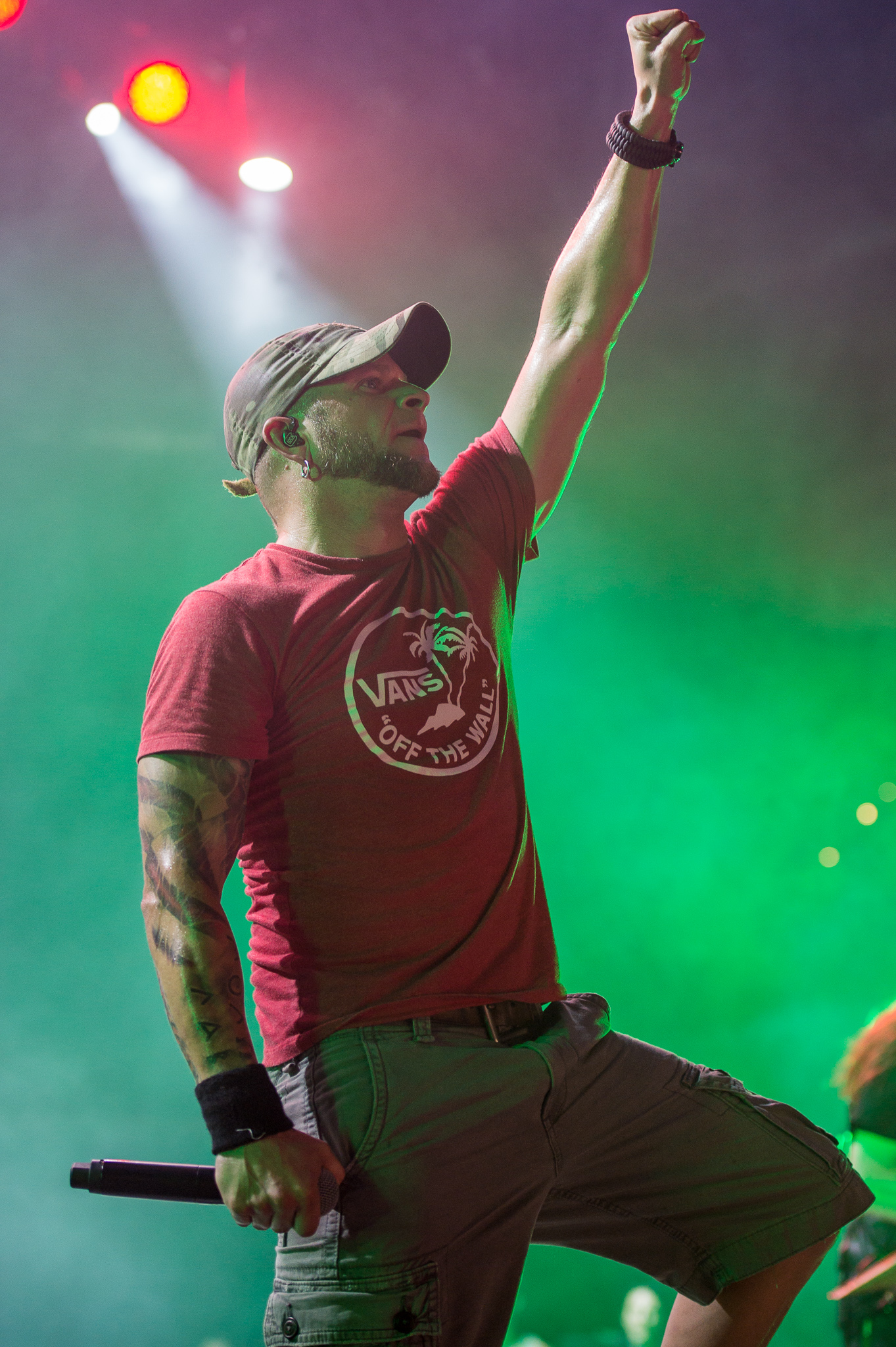 ARGO-Konzerte,All That Remains,Alternarena,Arena Nürnberger Versicherungen,Festival,Konzert,Livekonzert,Livemusik,Musik,Philip Labonte,RiP,Rock im Park 2015